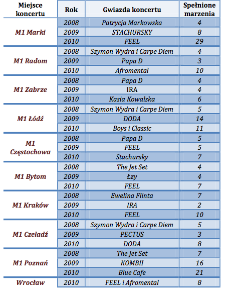 Rozpiska koncertów organizowanych wspólnie z Centrami M1